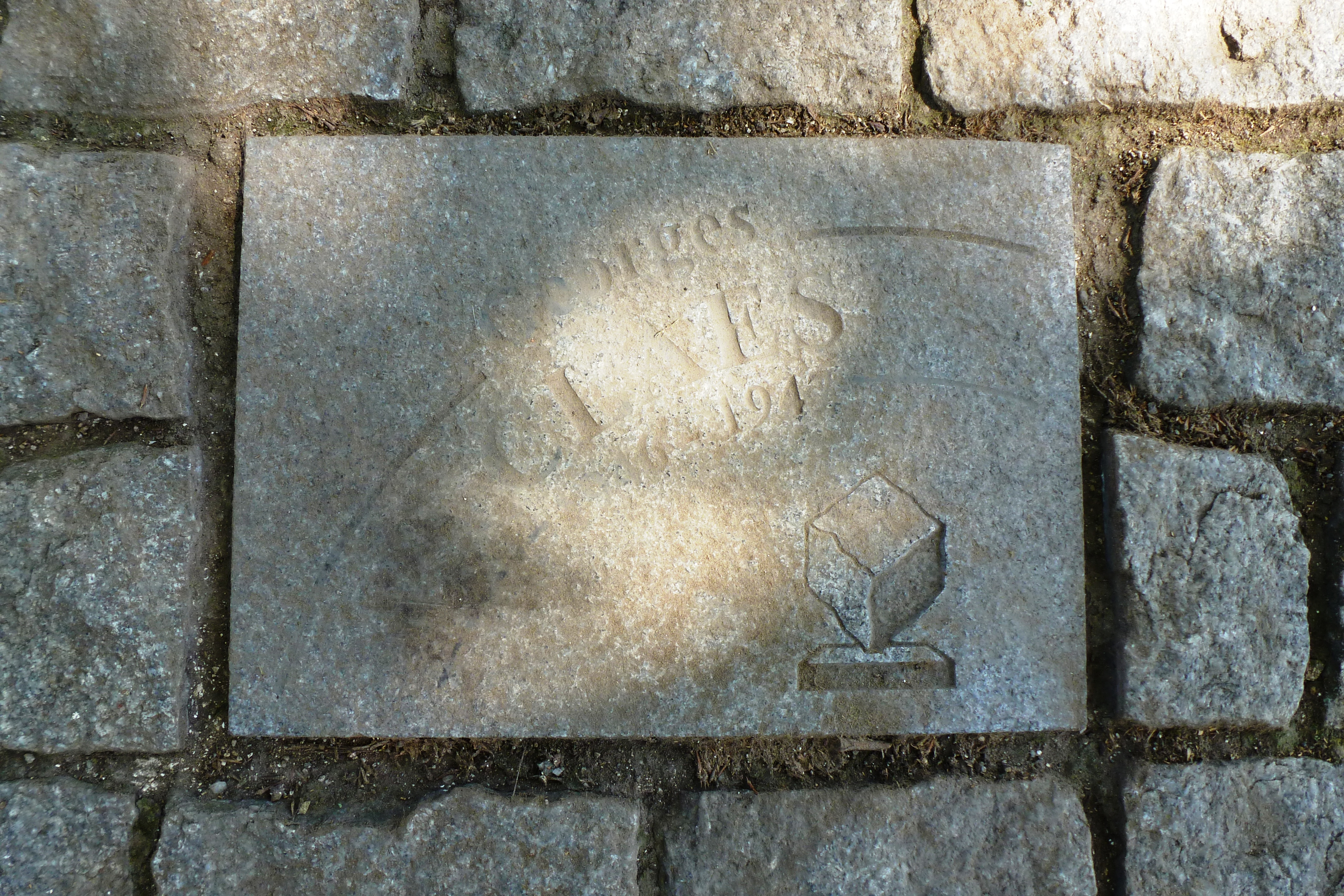 Pflasterstein für Georges Claes auf der Allée Charles Crupelandt in Roubaix